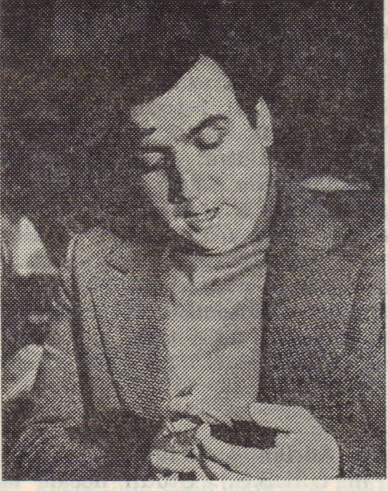 Scriitorul Adrian Păunescu